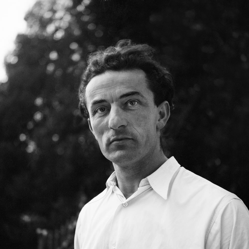 Portrait von Fritz Bürgin (1917–2003) Bildhauer, Zeichner. Fotografiert ca. 1950 von Theodor Strübin